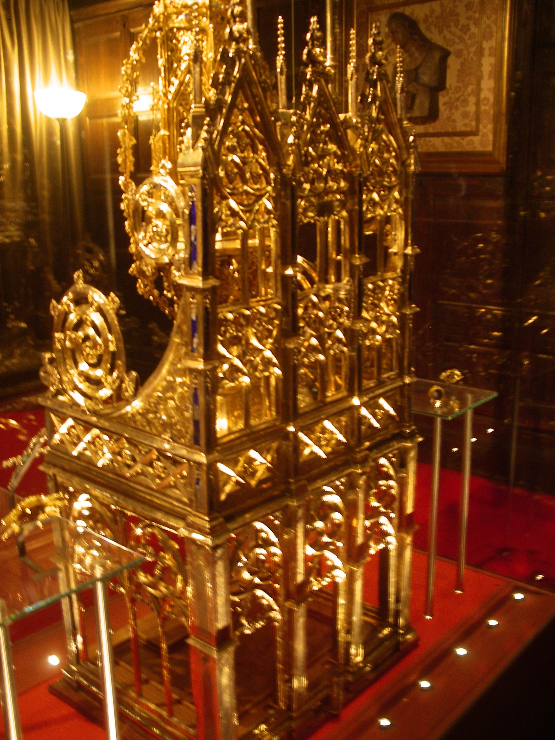 Cadira del Rei Martí i custòdia de la Catedral de Barcelona, s. XIV-XV